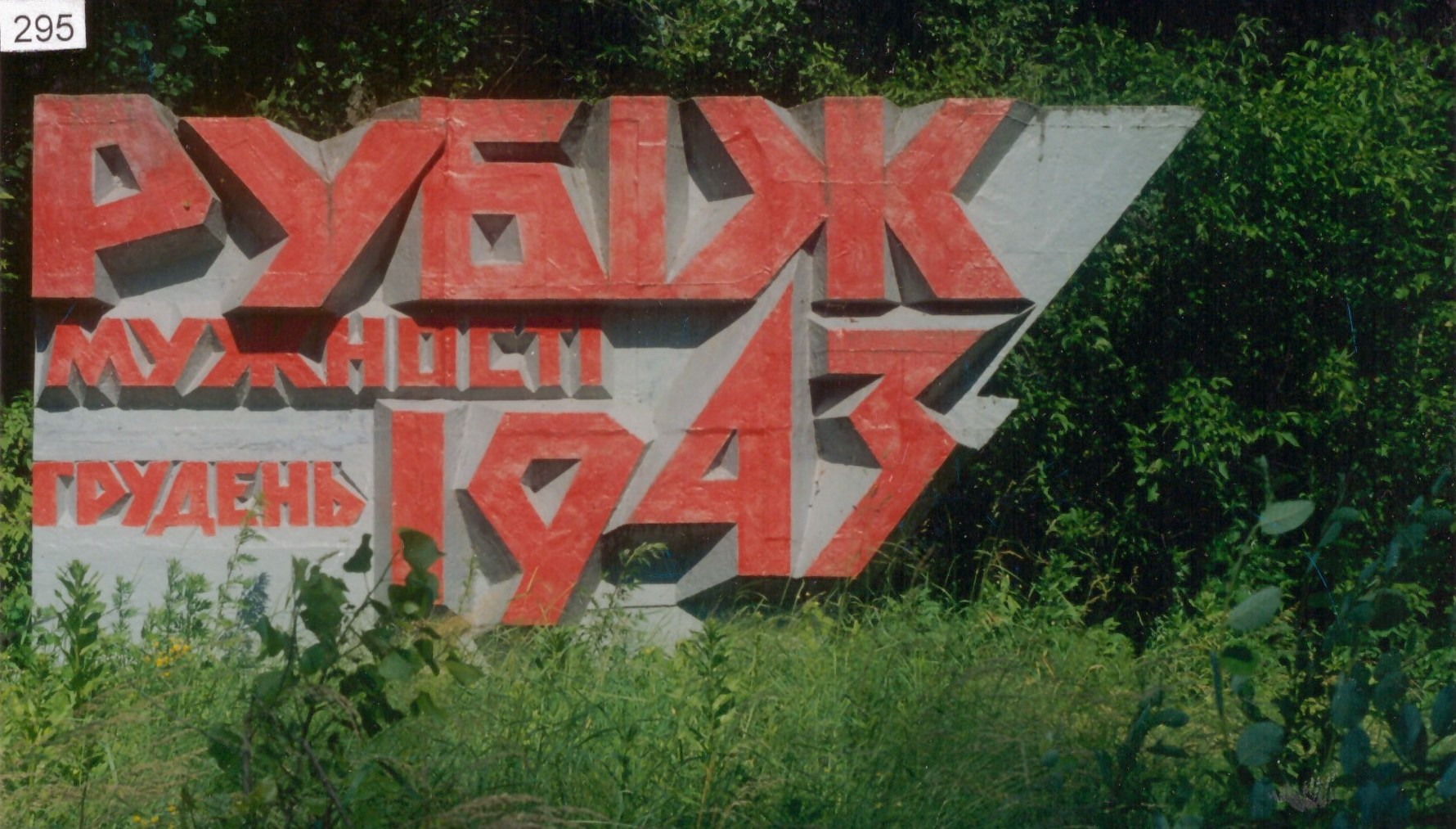 Меморіальний комплекс «Рубіж мужності Грудень 1943». С. Осівці Брусилівський район Житомирська область. 1994. Скульптор Таранченко В.О., архітектор Марчук М.Г. Кована мідь, метал, литий бетон, граніт.